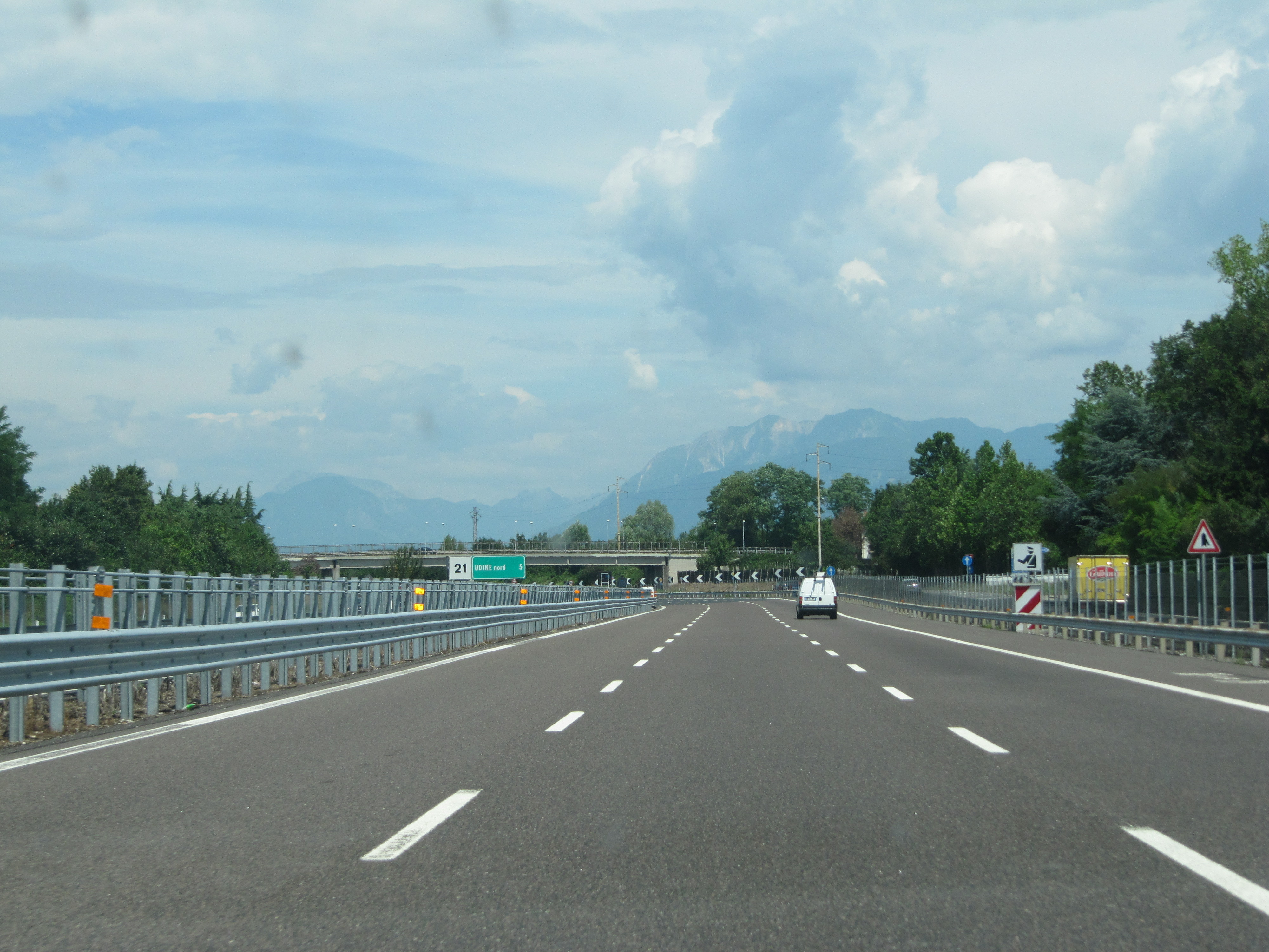 Neue Schutzplanken an der A23